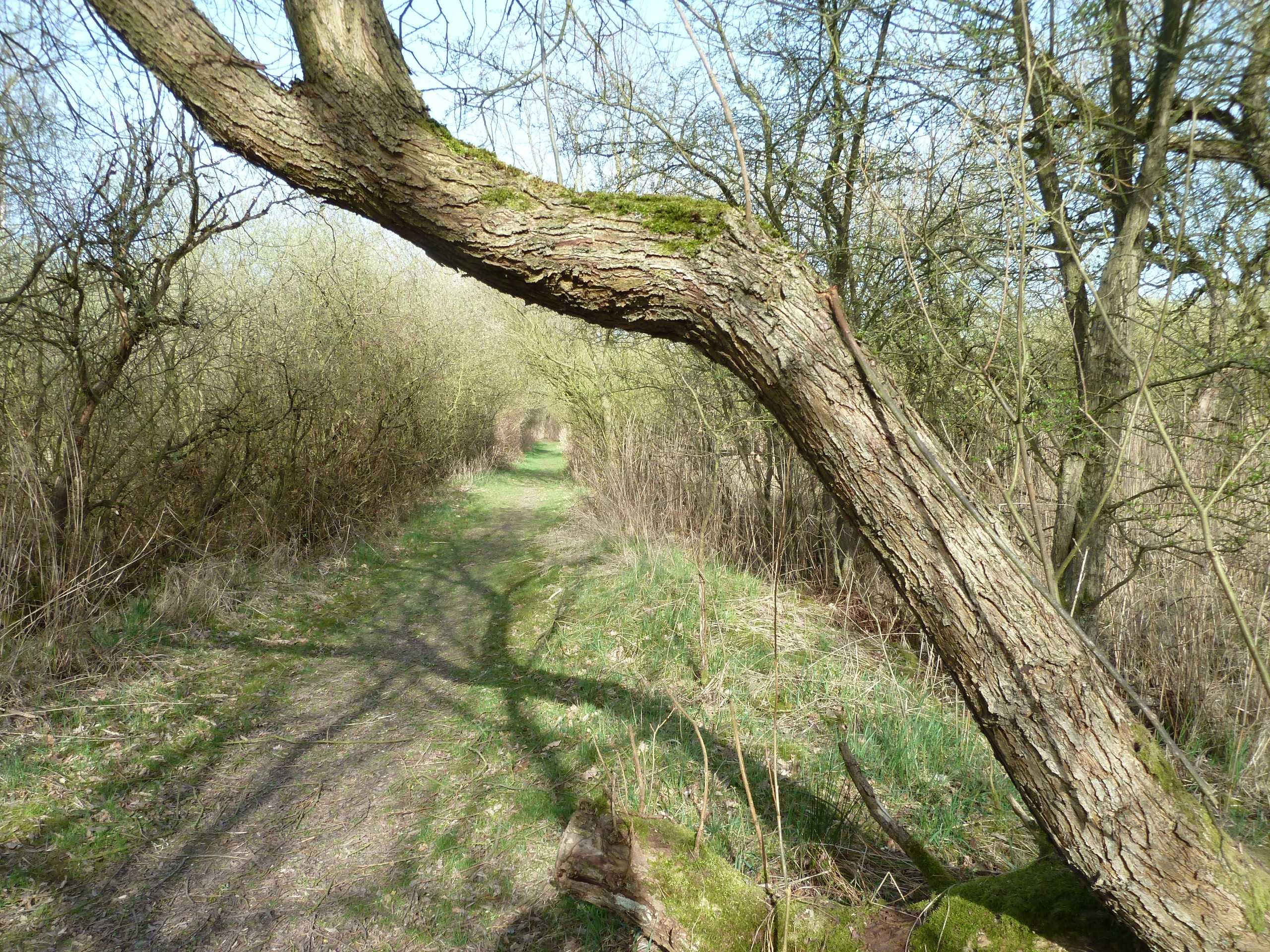 Wanderweg durch das Gebiet